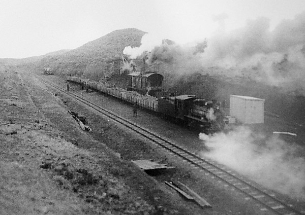 Vista de una Baldwin 2-8-2/4-4 transportanto cargas desde Punta Piedras